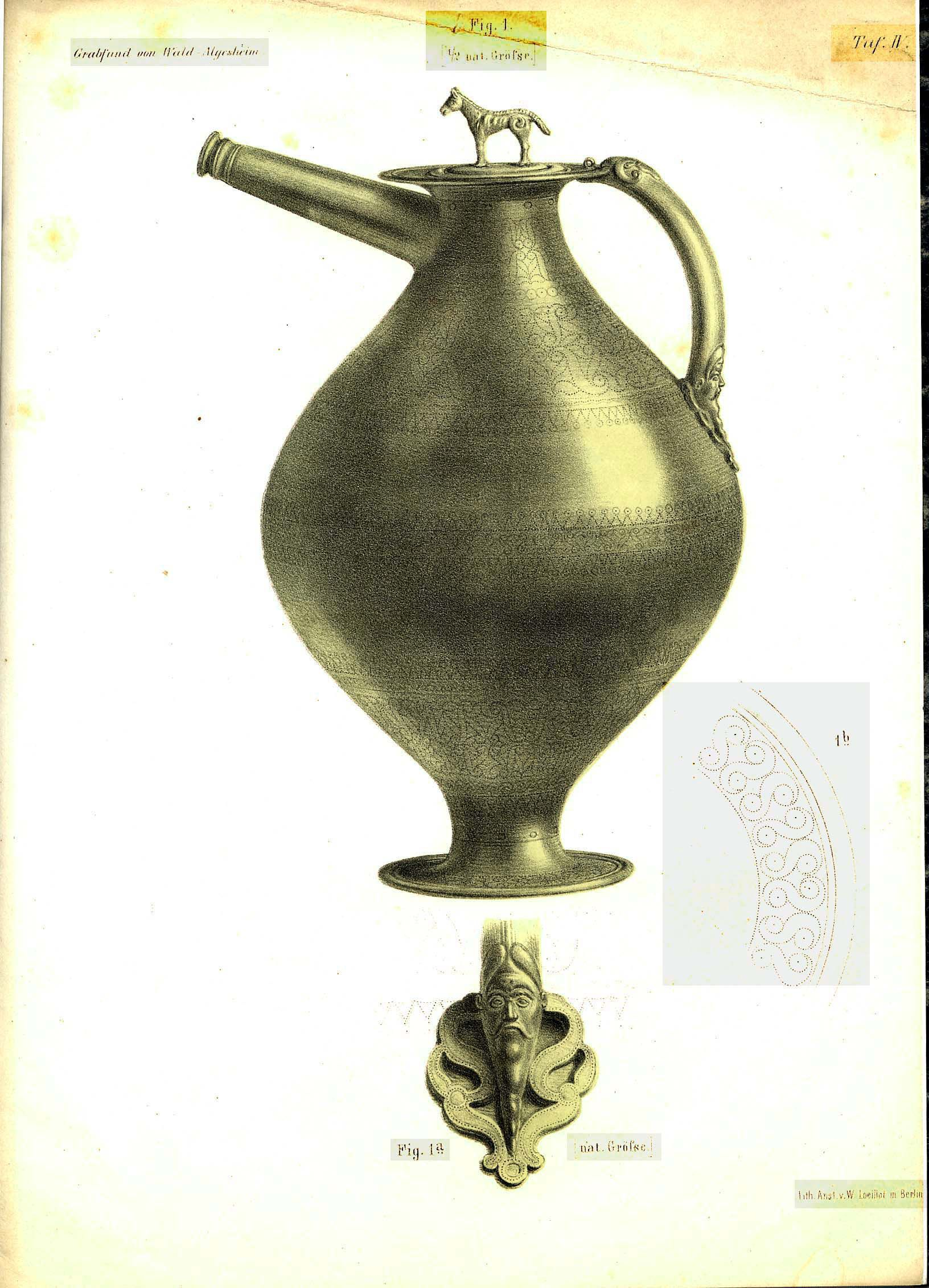 Röhrenkanne. Grabfunde des Waldalgesheimer Fürstengrabes